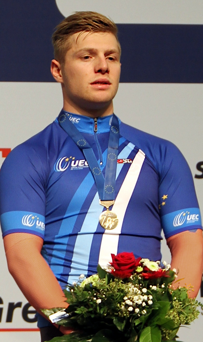 The making of this document was supported by the Community-Budget of Wikimedia Germany. Nils van 't Hoenderdaal, niederl. Radsportler